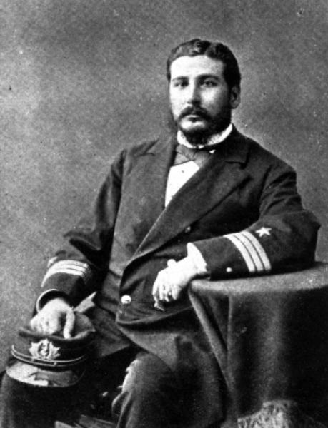 Juan José Francisco Latorre Benavente (Santiago, Chile, 24 de marzo de 1846 - Viña del Mar, Chile, 9 de julio de 1912). Marino chileno, uno de los principales actores de la Guerra del Pacífico, vencedor del Combate Naval de Angamos.